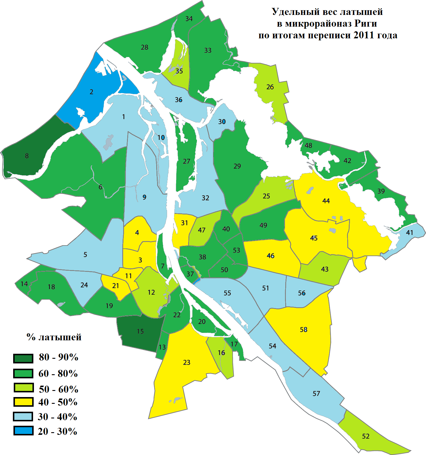 Удельный вес (%) латышей в микрорайонах Риги по итогам переписи населения 2011 года